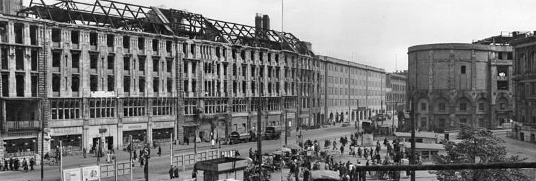 Zentralbild Junge 23.4.52 Panorama Berlin 1952 Blick auf den Potsdamer Platz - Stresemannstraße. (Kritikaufnahme für "Frischer Wind") Information added by Wikimedia users.Einmündung Stresemannstraße in den Potsdamer Platz, links Ruine des Hotels Fürstenhof (abgetragen), rechts daneben Stresemannstraße 128 (ehem. Preußisches Landwirtschaftsministerium, Erweiterungsbau, jetzt Bundesumweltministerium), daneben ehem. General-Militärkaserne (abgetragen), rechts der beschädigte Rundbau des Hauses Vaterland (abgetragen).